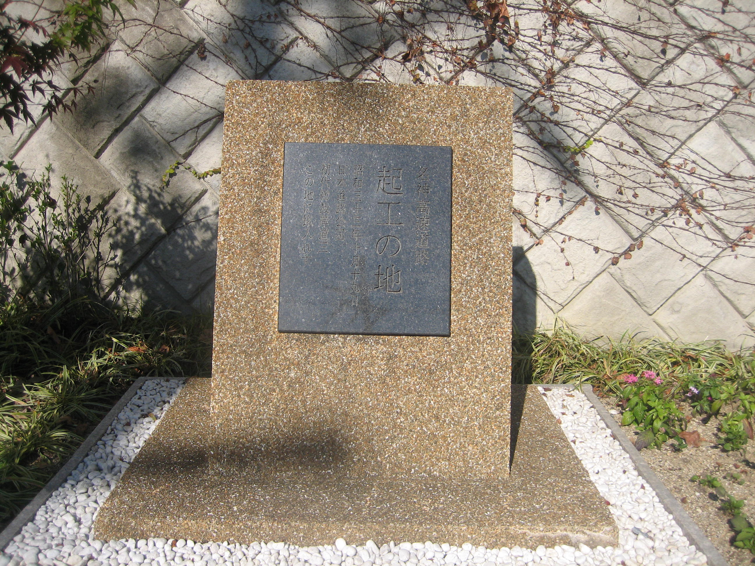 名神起工の地の石碑。